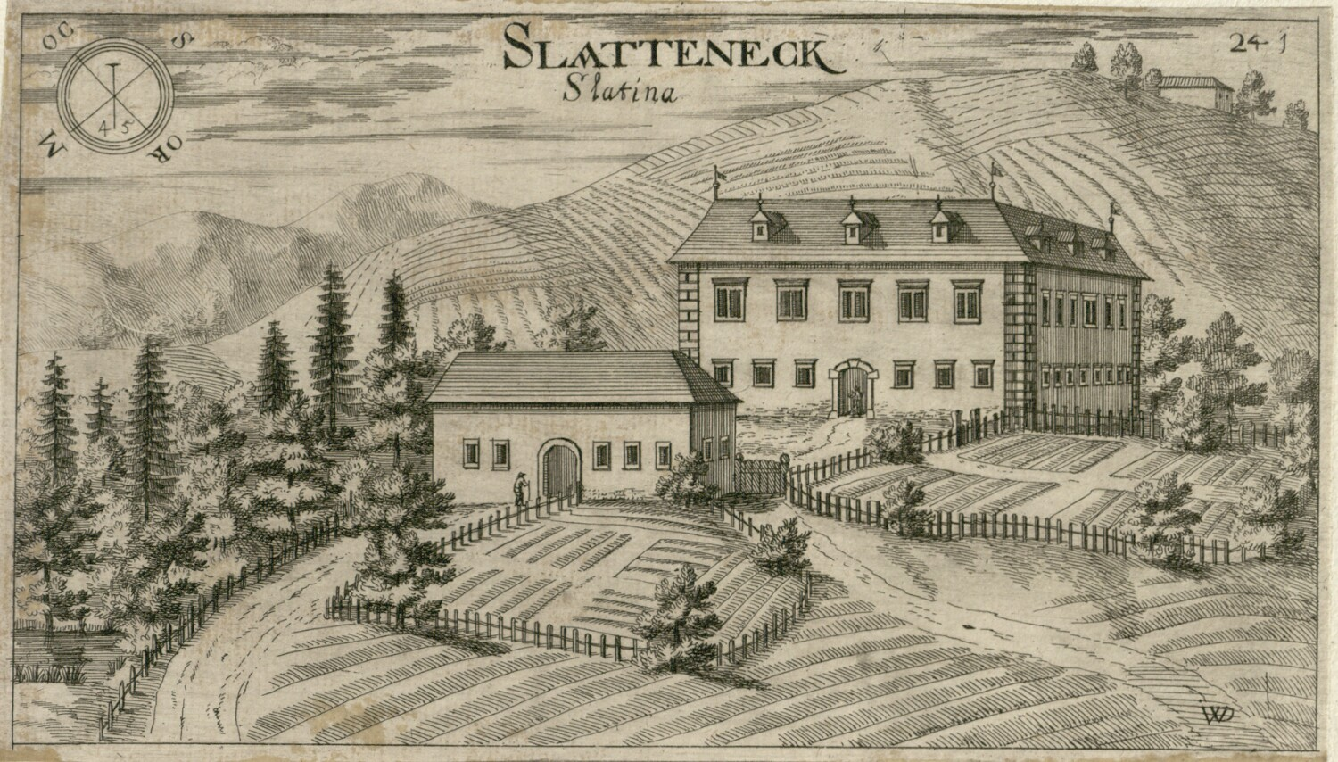 Dvorec Slatna